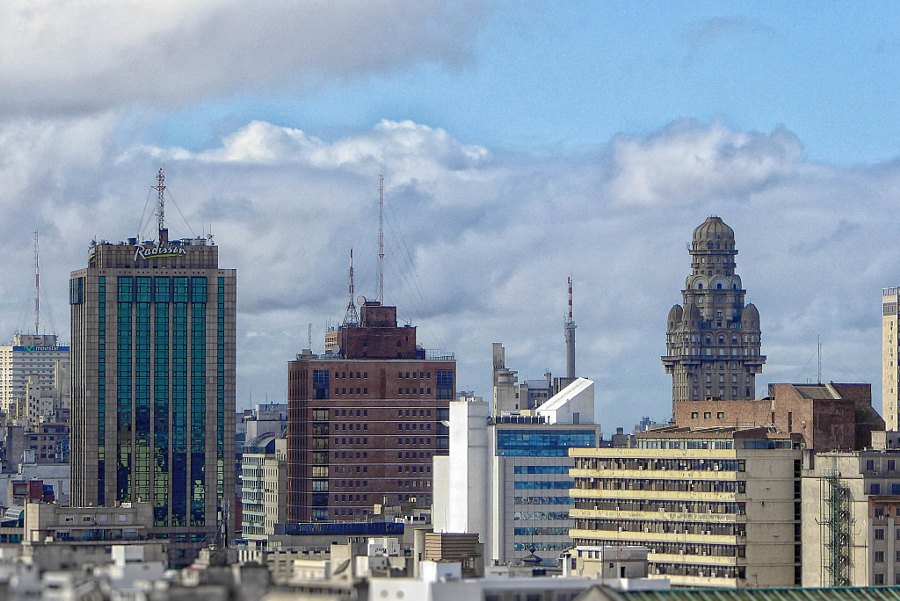 Вид на центральную часть Монтевидео